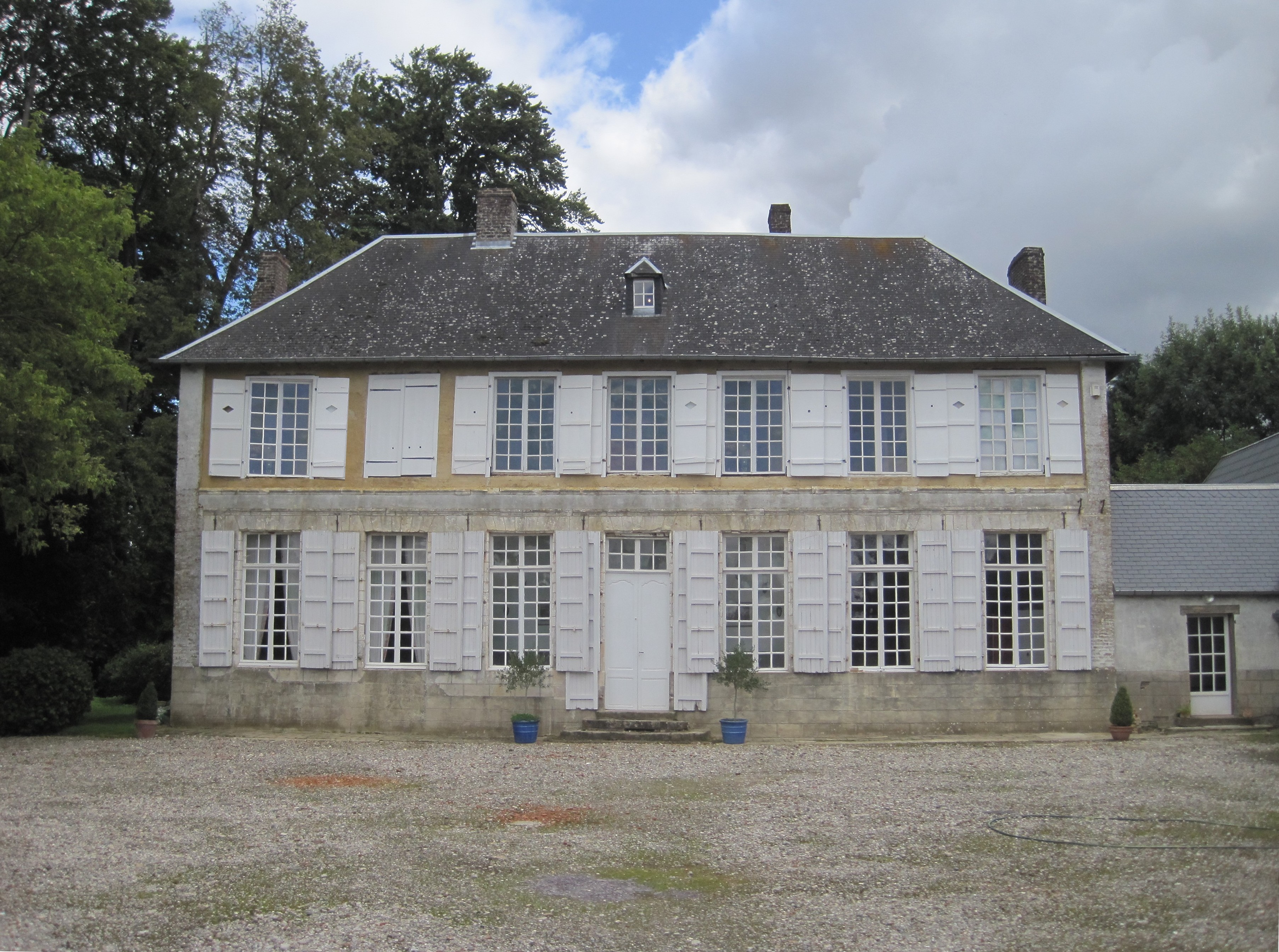 Château de Pommera façade ouest